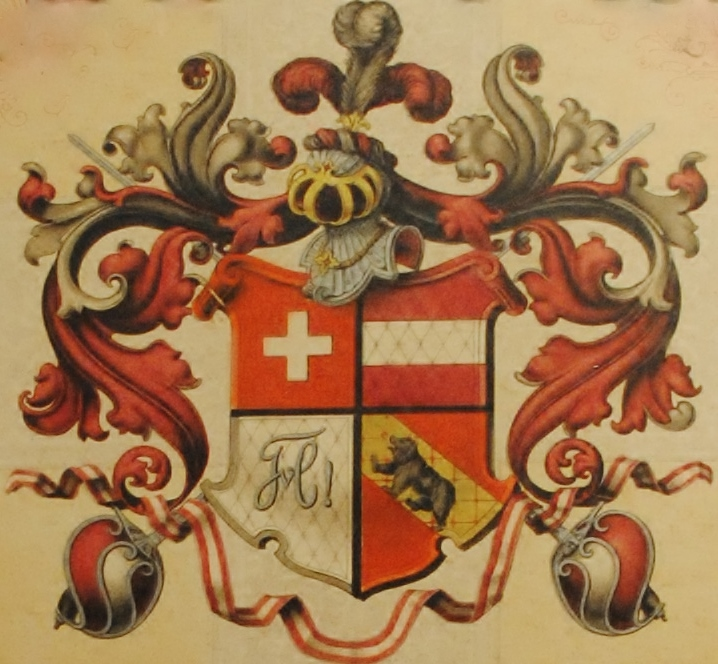 Retusche des Wappens der Helvetia Bern